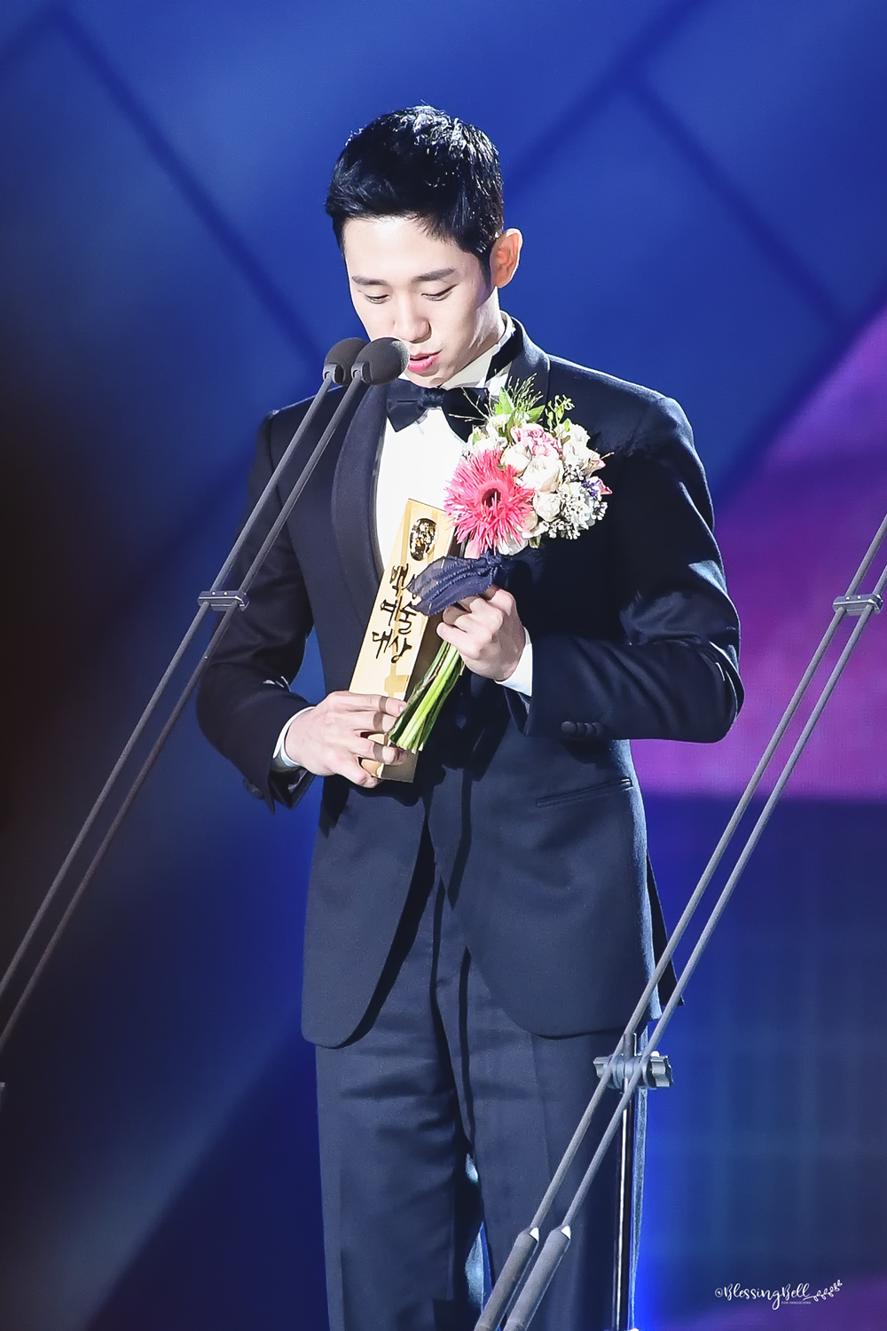 180503 54회 백상예술대상